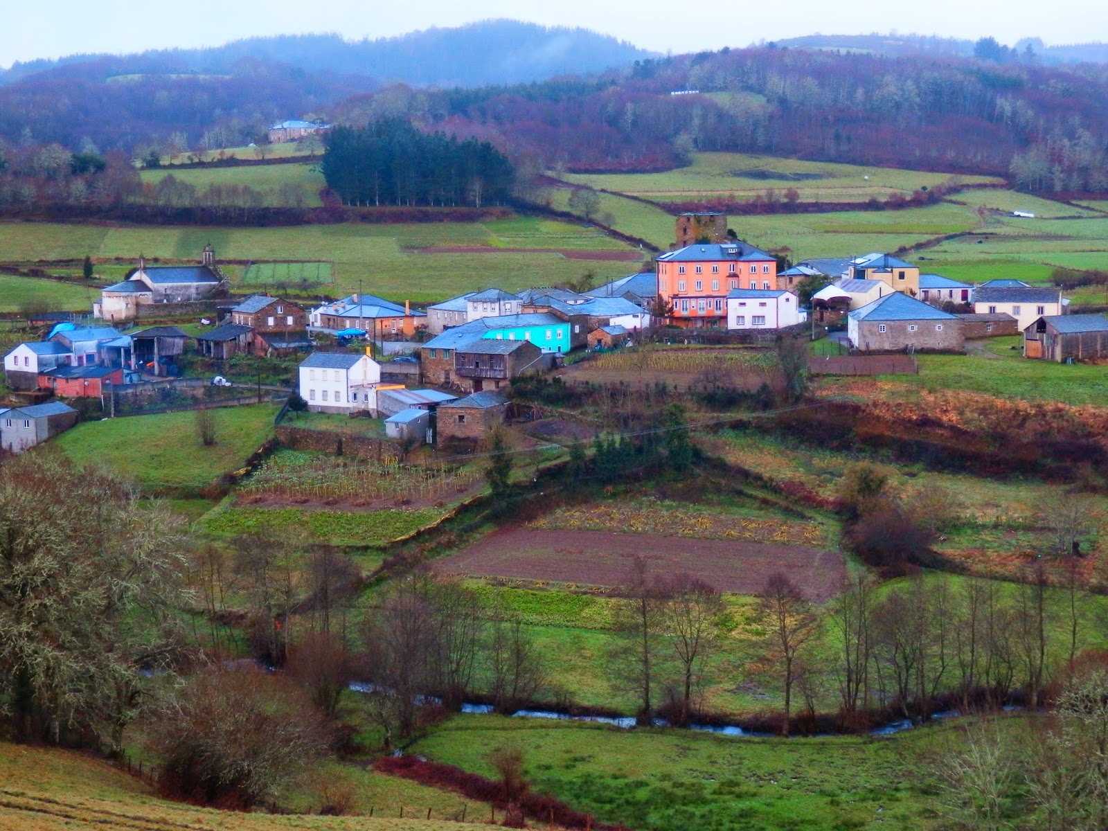 A Proba de Burón co río Proba, A Fonsagrada.